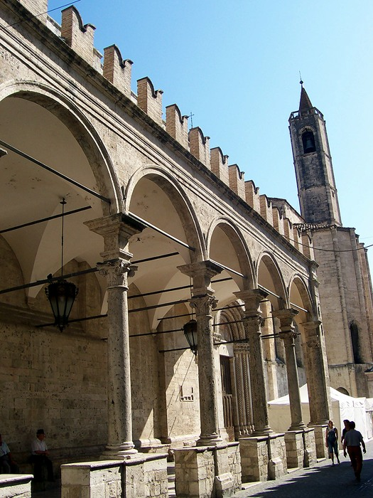 Ascoli Piceno - Loggia dei Mercanti